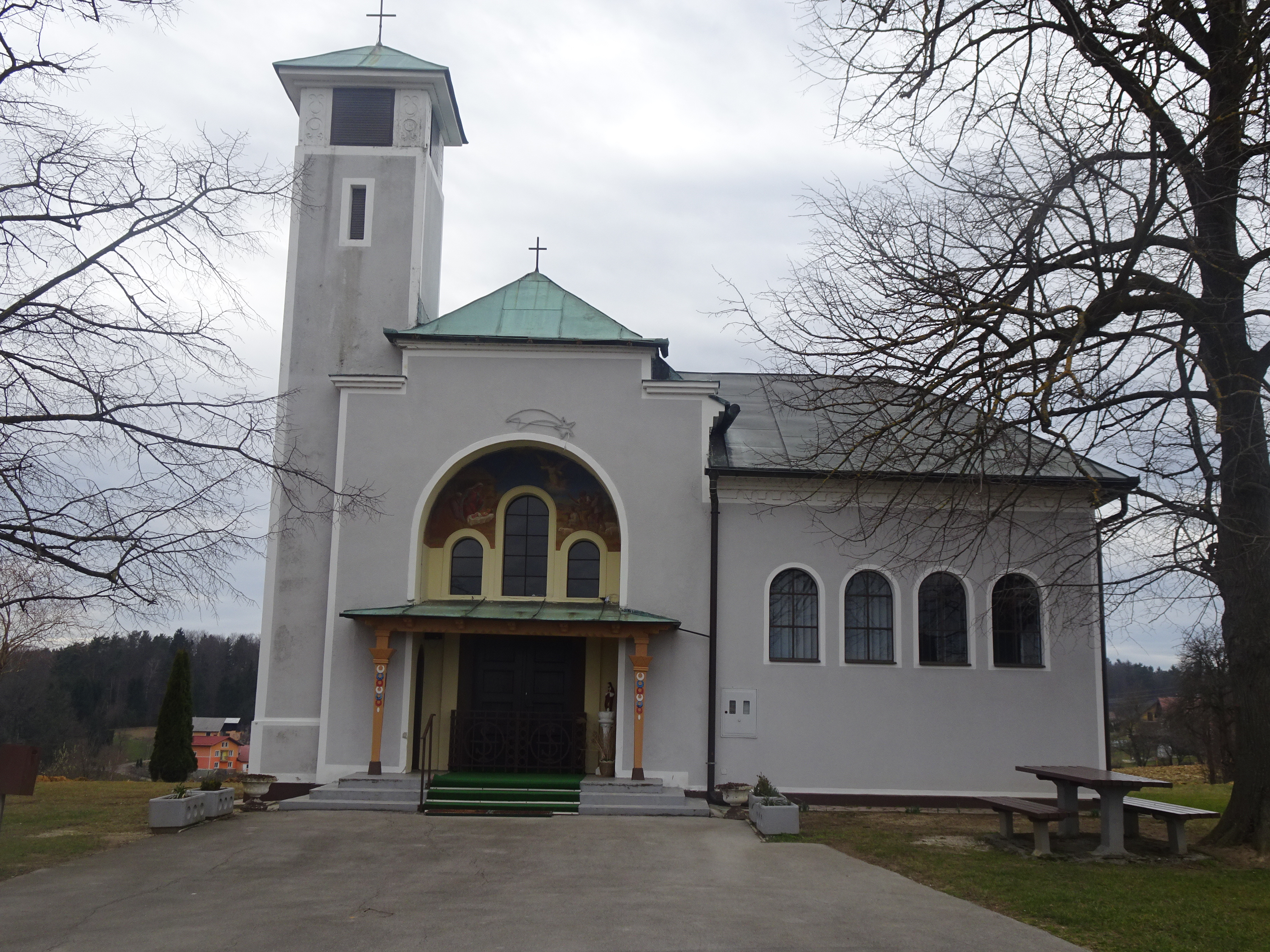 Kapela Srca Jezusovega, Žabljek, Župnija Laporje